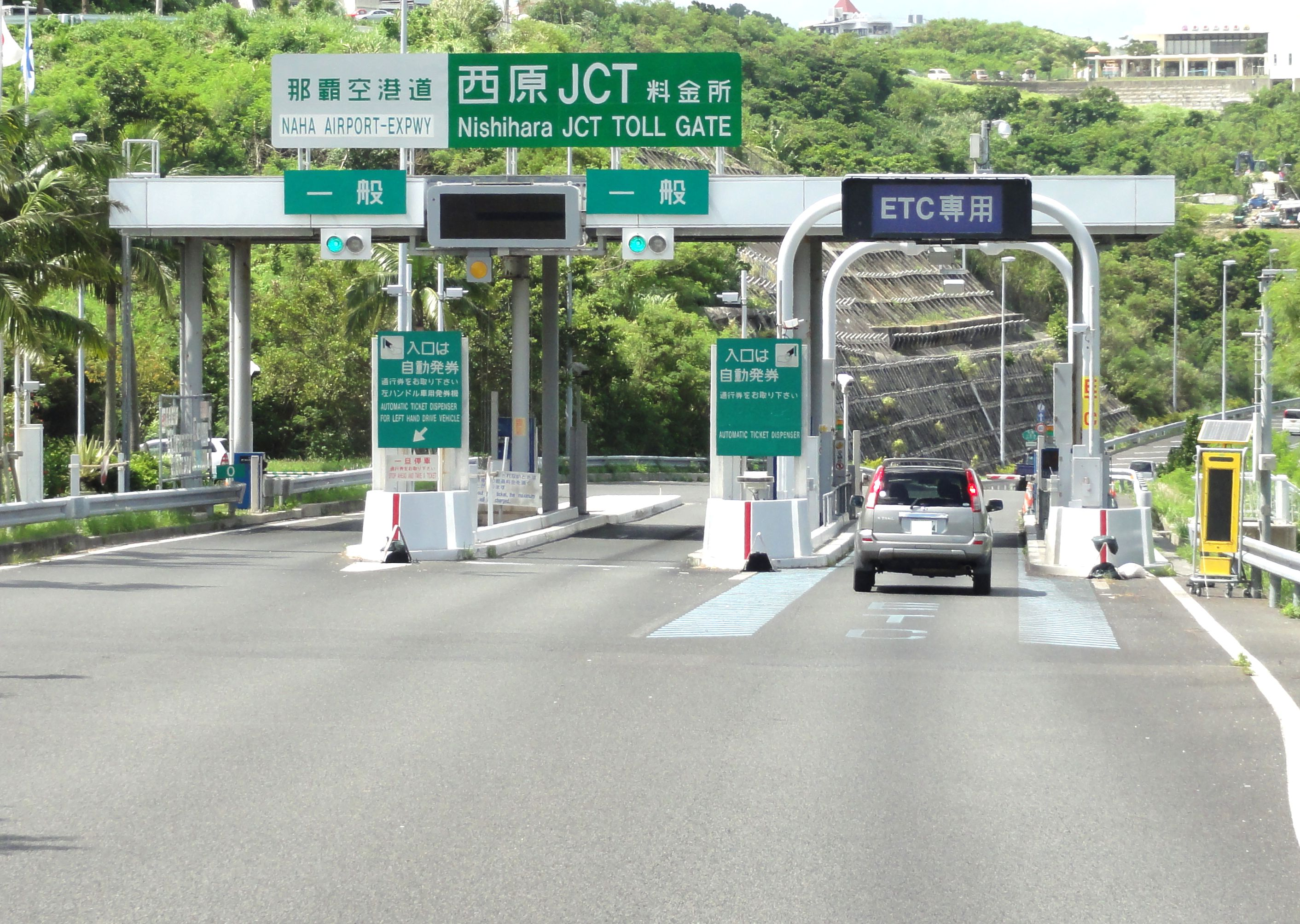 南風原北インターチェンジ